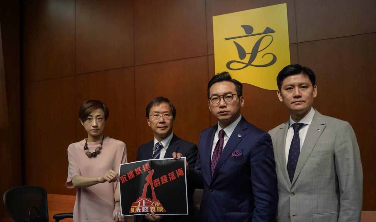 公民黨立法會議員(右起)譚文豪、楊岳橋、郭家麒、陳淑莊反對”明日大嶼願景計劃”。(公民黨照片)